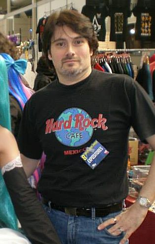 Escritor español de ciencia-ficción y fantasía